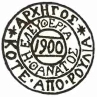 Печат на дееца на ВМОРО, а по-късно андартски капитан Коте Христов.